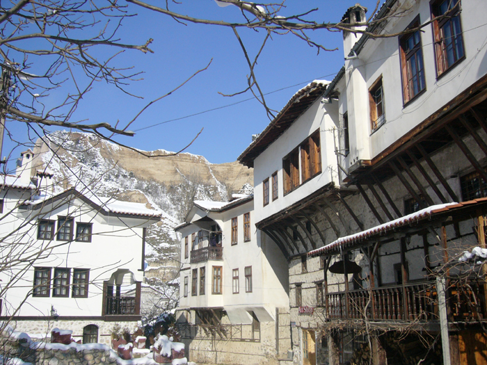 Melnik3.jpg